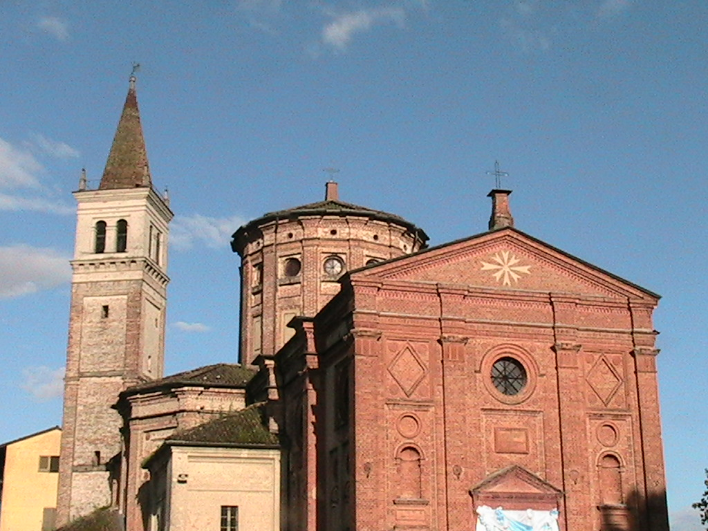 Castelleone - Santuario della Beata Vergine della Misericordia